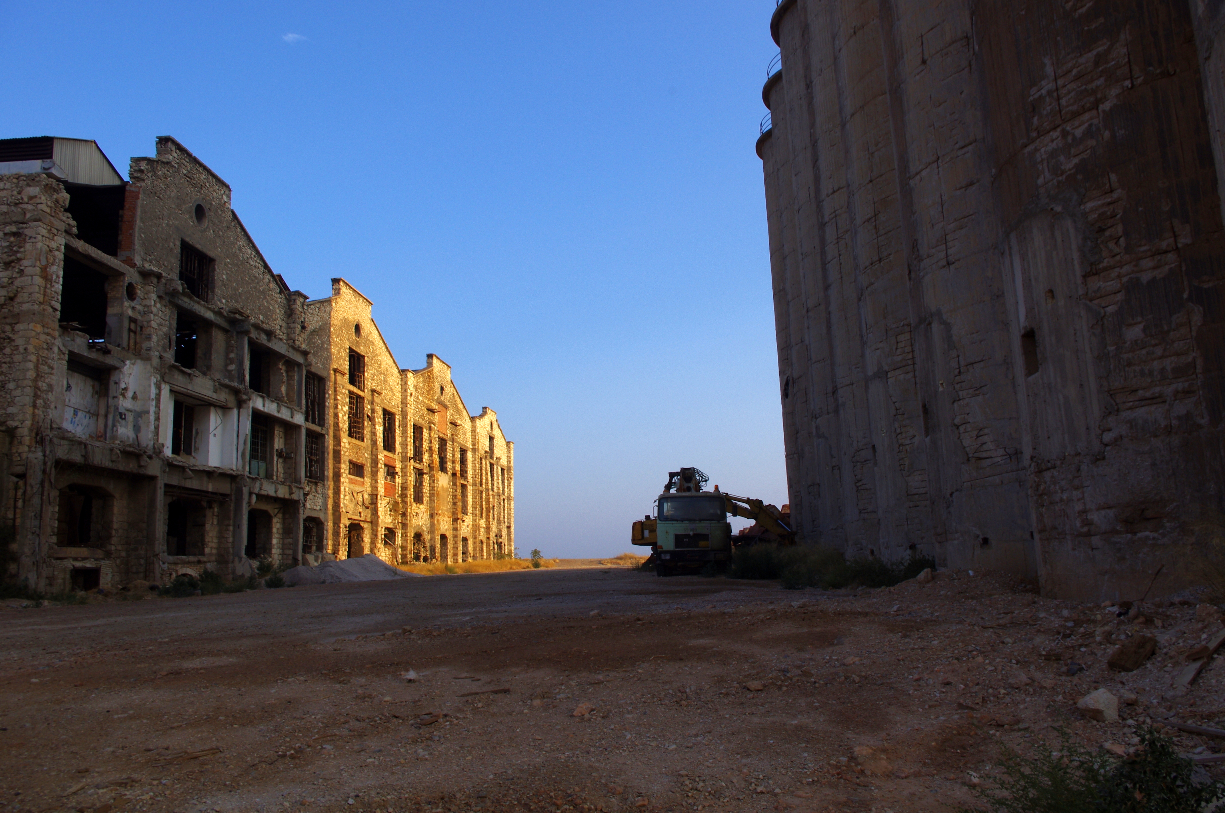 Συγκρότημα Εργοστασίου Λιπασμάτων και Χημικών Προϊόντων («Λιπάσματα Δραπετσώνας»)«Συγκρότημα Εργοστασίου Λιπασμάτων και Χημικών Προϊόντων («Λιπάσματα Δραπετσώνας»)»